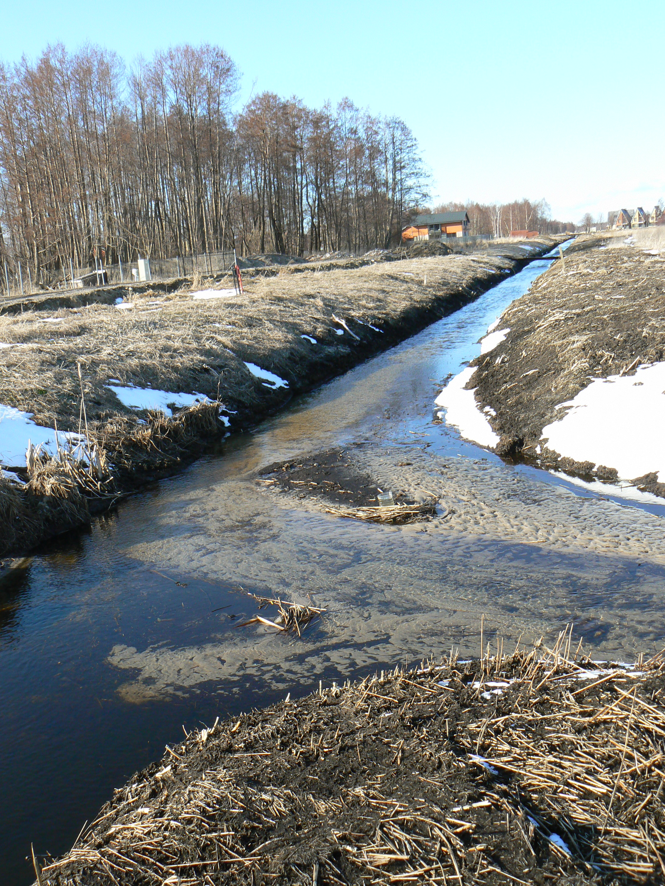 Soutok neznámého pravého přítoku a Vanagupė dává vznik Ošupisu v tomto místě. Pravý přítok přitéká od východu. Pohled po proudu, t.j. k severu u vsi UžkaniavaiLietuvių: Vanagupė su dešiniuoju intaku jungiasi į Ošupį. Užkaniavai